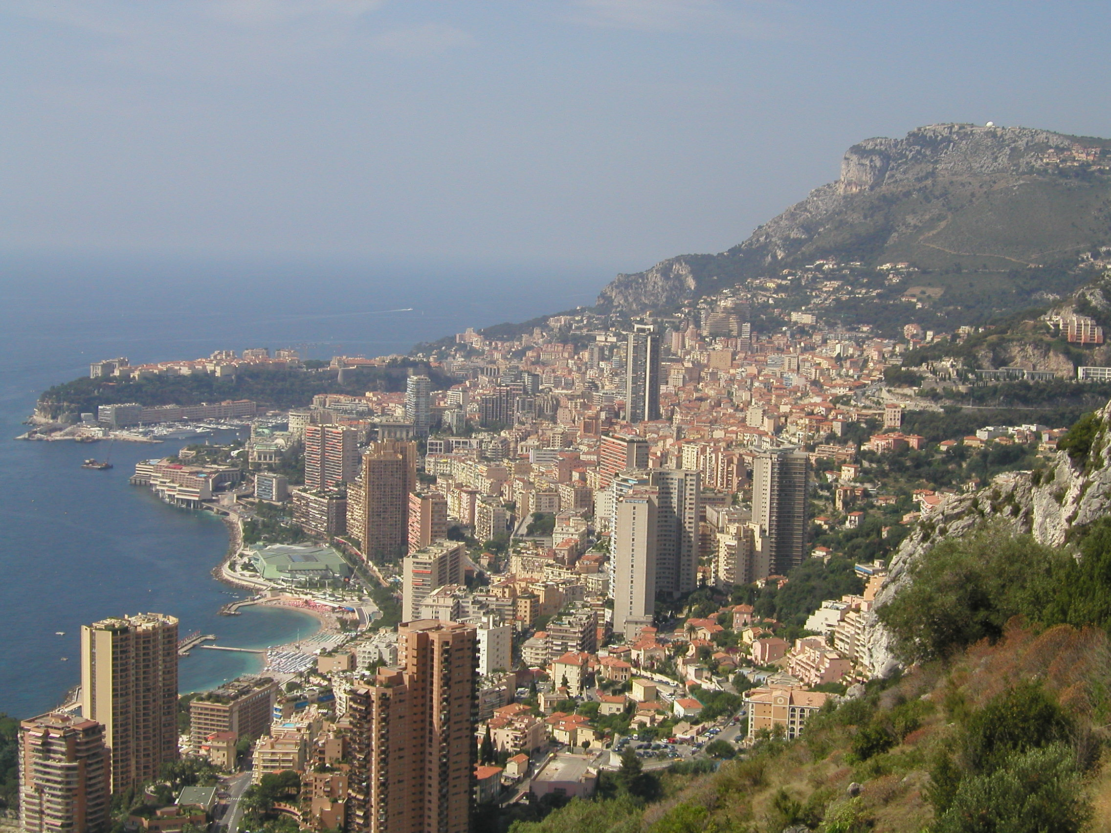 Břeh Středozemního moře v Monaku